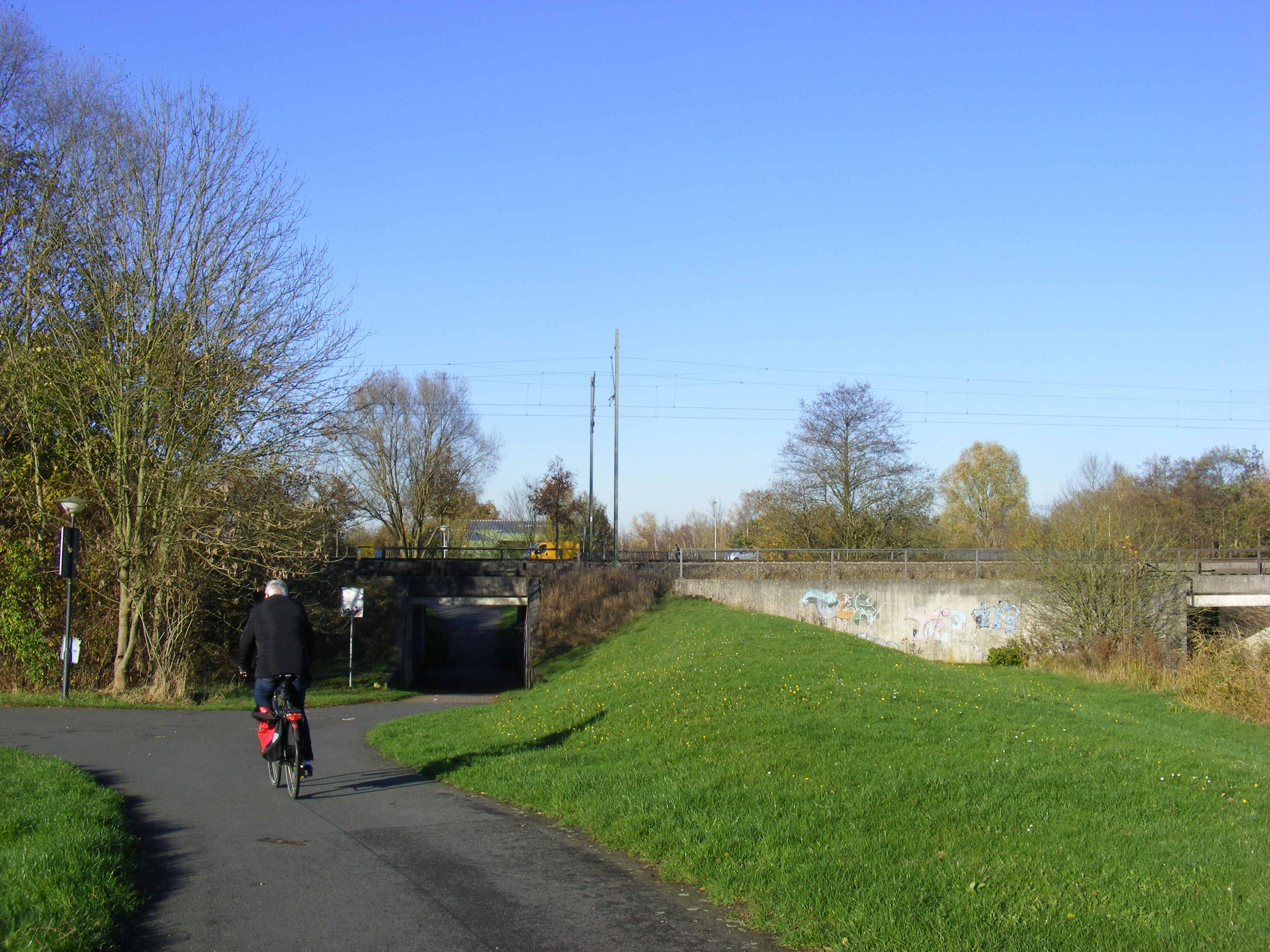 Eisenbahnunterführung am Nordende des Parks Links der Weser am linken Deich der neuen Ochtum, links Verbindung zur Alten Heerstraße in Mittelshuchting, geradeaus zum Wardamm und dann auf diesem rechts nach Woltmershausen.